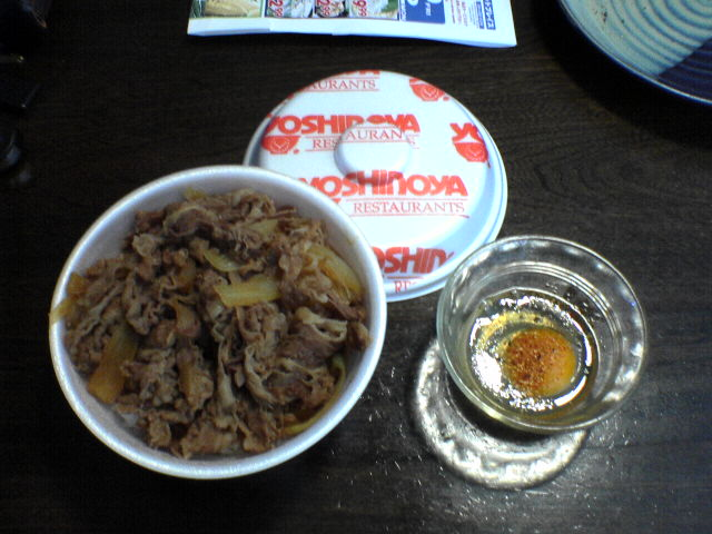 「ごち」が１：３０でしまっちゃったのでCupertinoのYOSHINOYAでto go